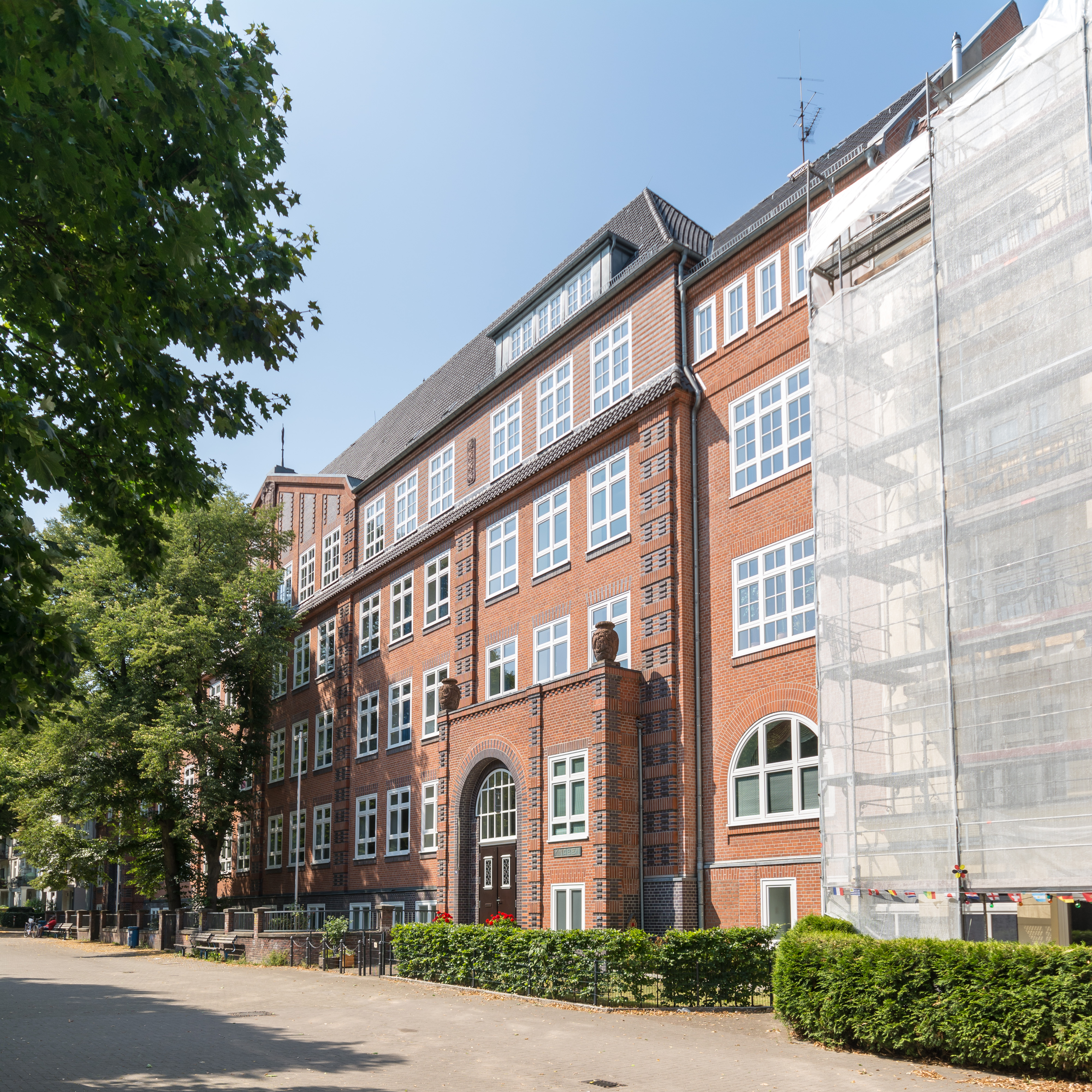 Schule Lutterothstraße 78-80 in Hamburg-Eimsbüttel. This is a photograph of an architectural monument.